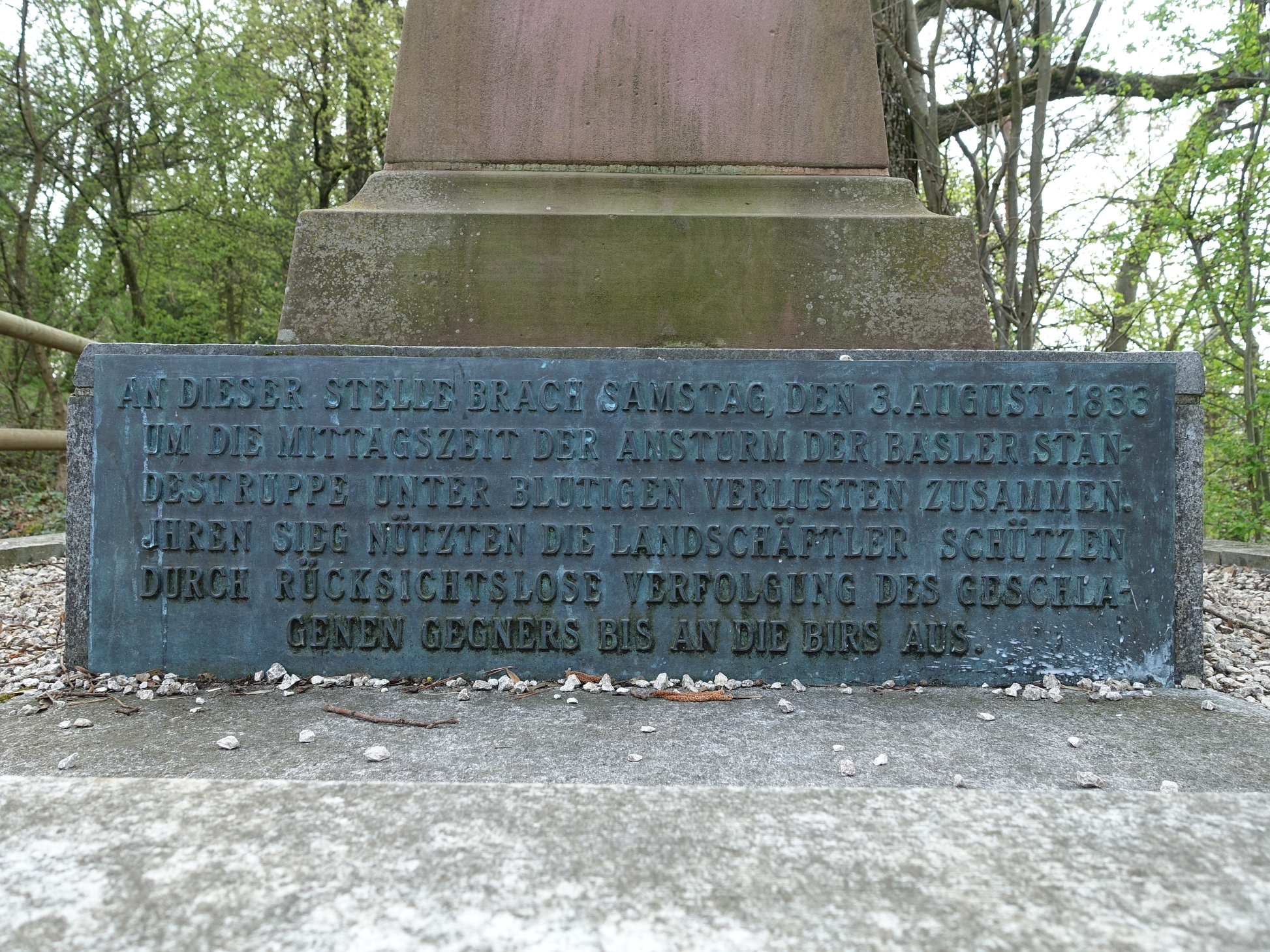 Am Hülftenschanz Denkmal Sockel ist folgende Inschrift zu sehen. An dieser Stelle brach Samstag den 3. August 1833 um die Mittagszeit der Ansturm der Basler Standestruppe unter blutigen Verlusten zusammen. Jhren Sieg nützen die Landschäftler Schützen durch rücksichtsloses Verfolgen des geschlagenen Gegners bis an die Birs aus.